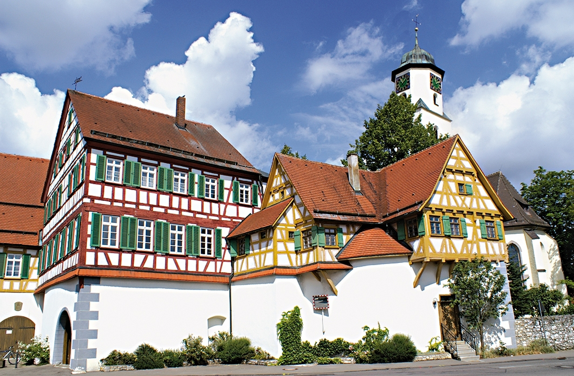 In der Laichinger Kirchenburg ist auch das Heimat-und Webereimuseum der Leinenweberstadt untergebracht.